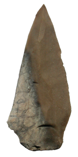 חוד מצור - חפירות נחל מחניים